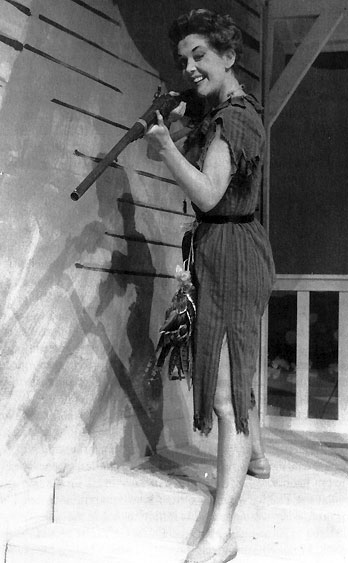 Maj Lindström